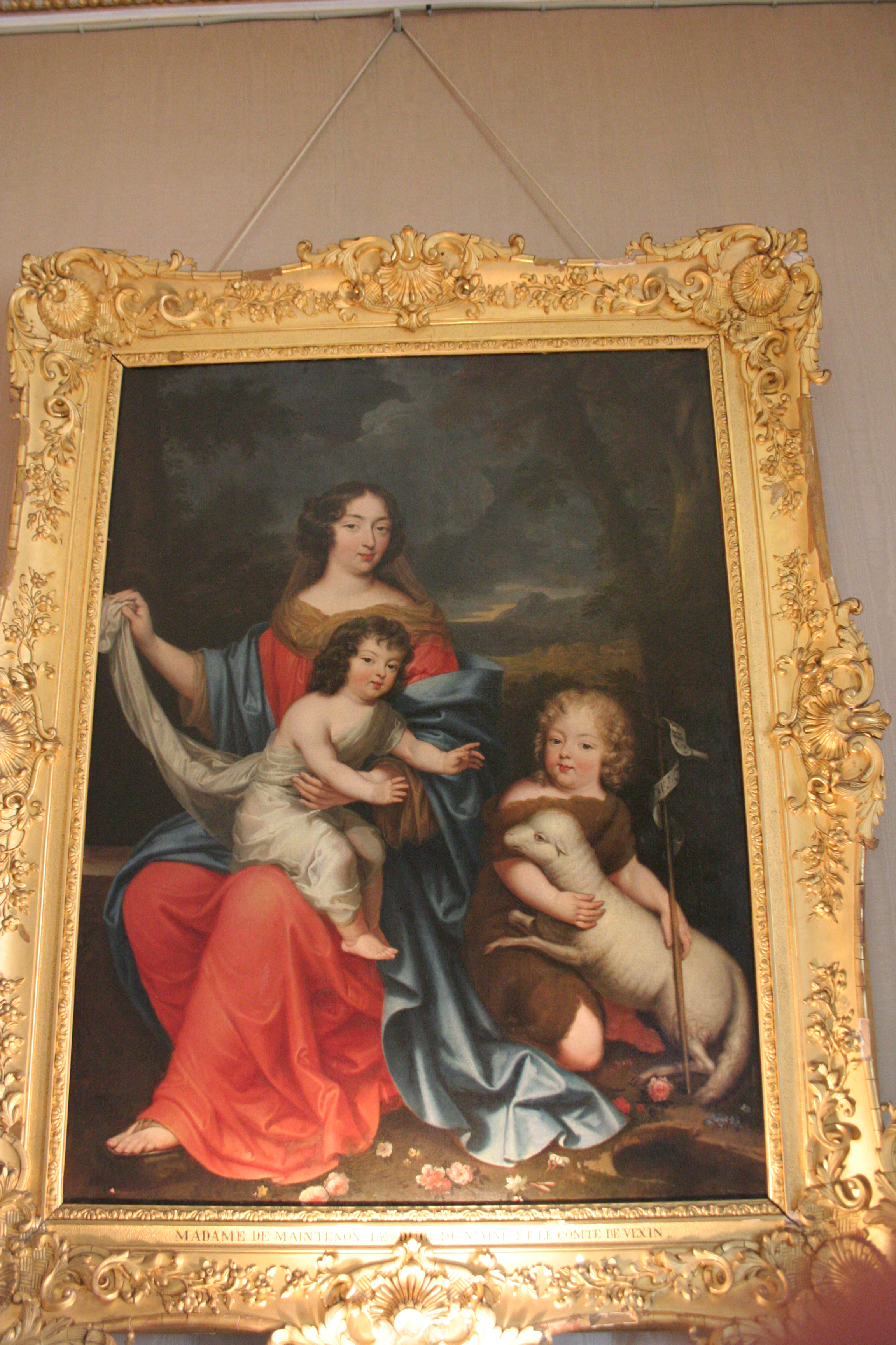 Madame de Maintenon, accompagnée de Louis-Auguste de Bourbon et Louis-César de Bourbon, les fils légitimés de Louis XIV et de Madame de Montespan.